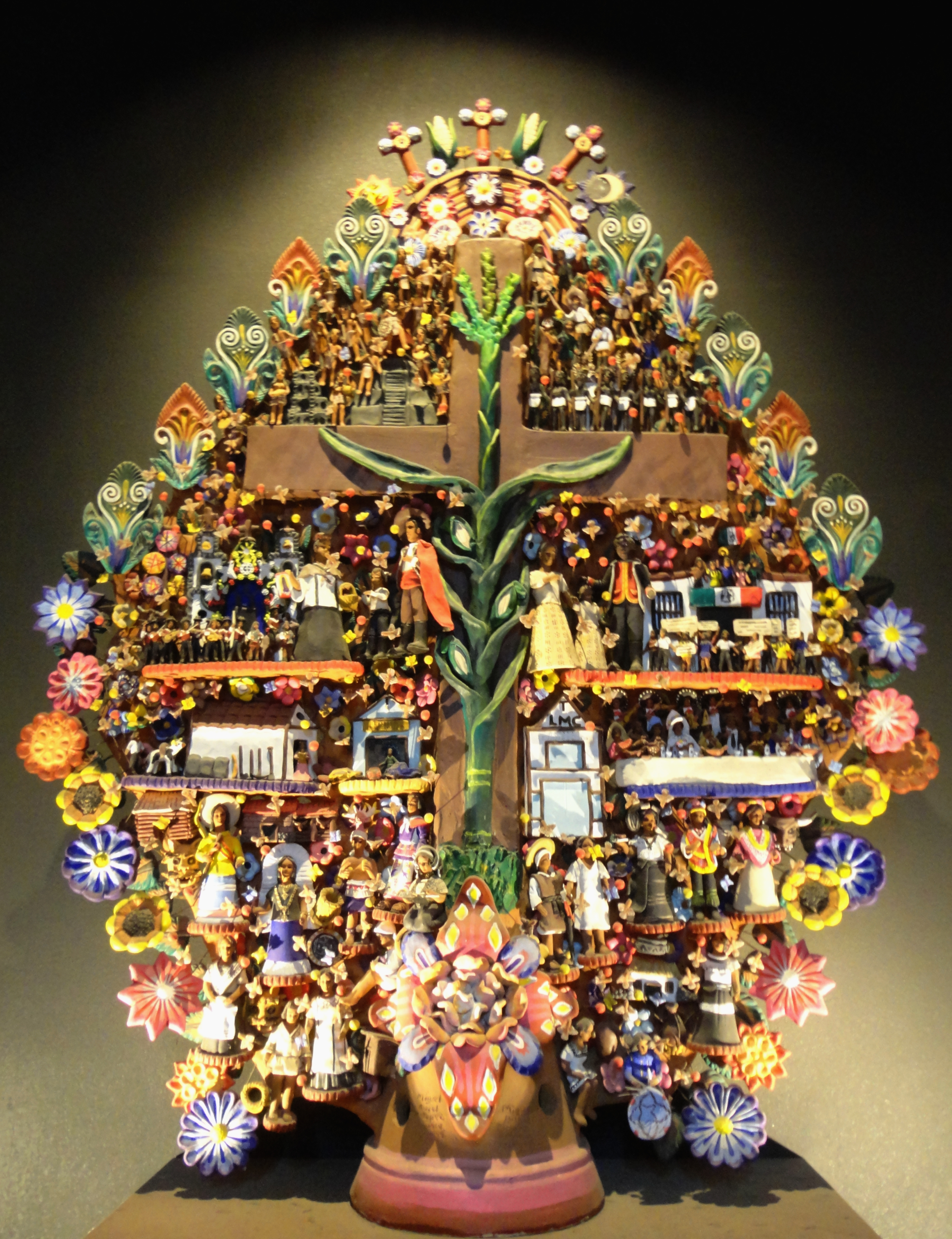 Árbol de la Vida, artesanía en barro de Metepec, Estado de México.